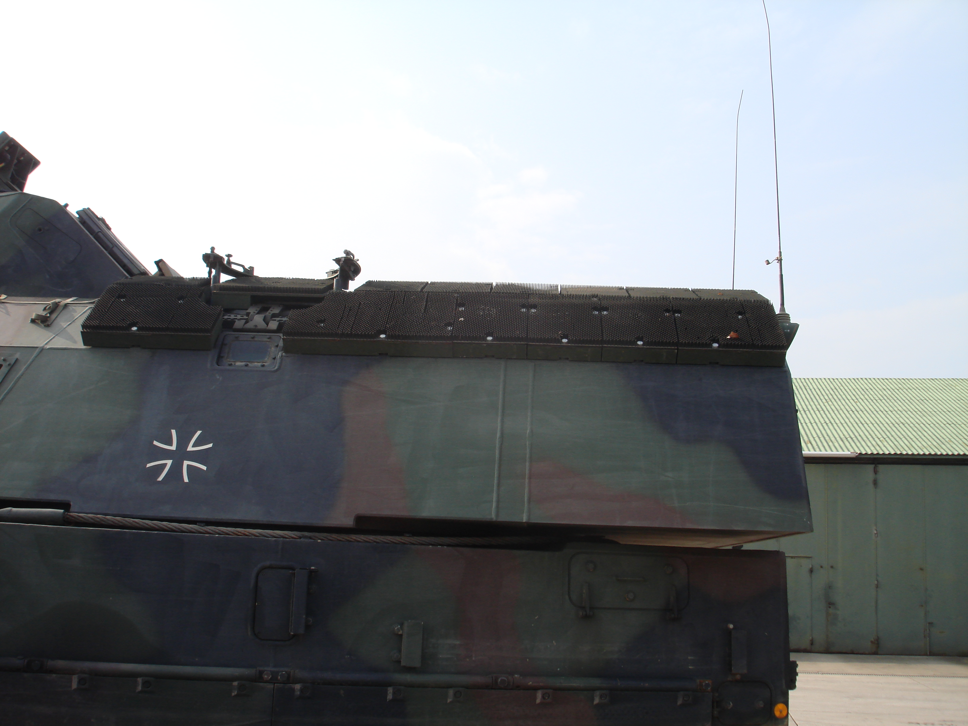 Panzerhaubitze 2000 beim Tag der offenen Tür der Wehrtechnische Dienststelle für Kraftfahrzeuge und Panzer (WTD 41) in Trier. Der Igel-Dachschutz im Detail.